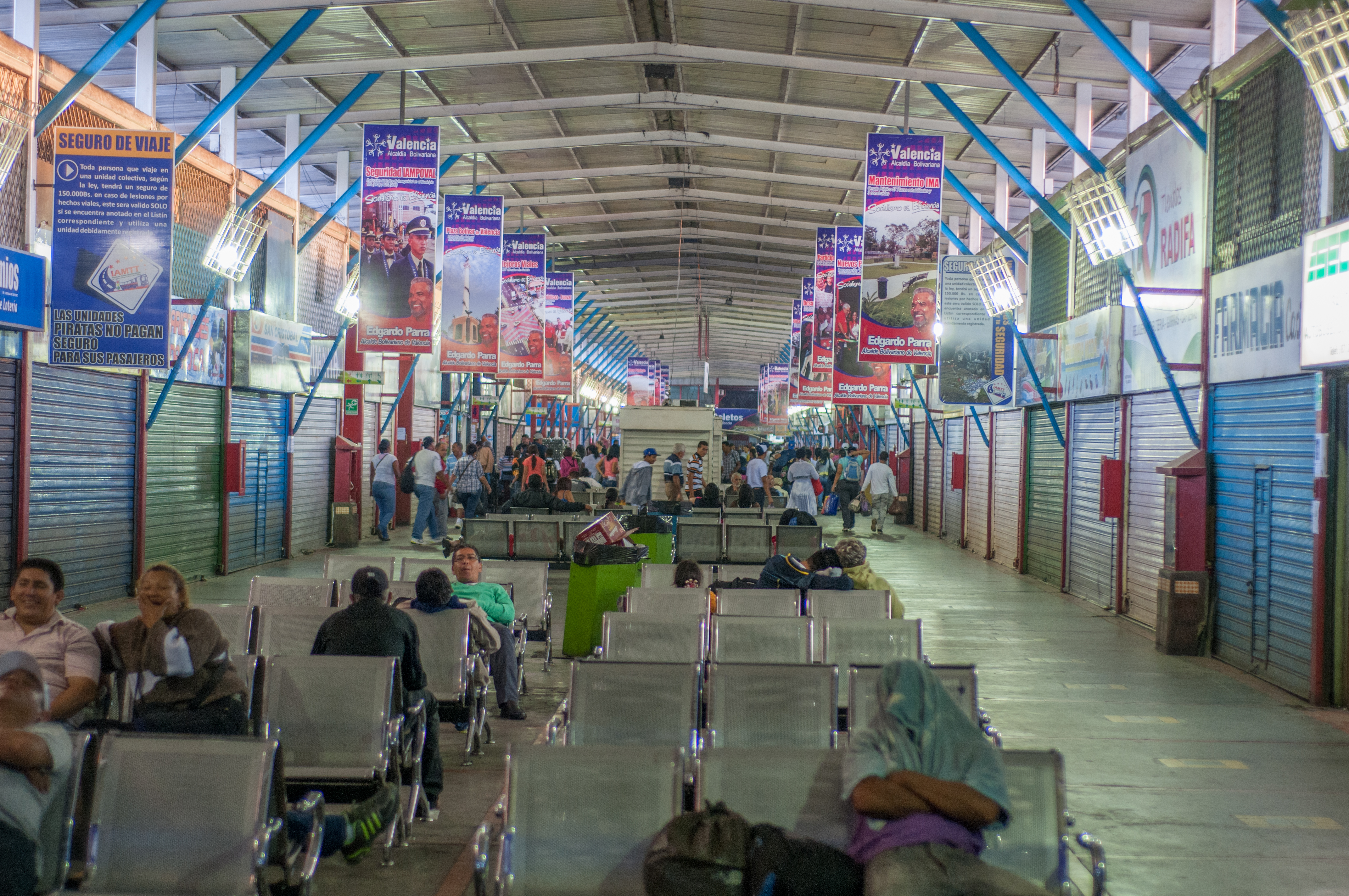 Big low de Valencia, Venezuela